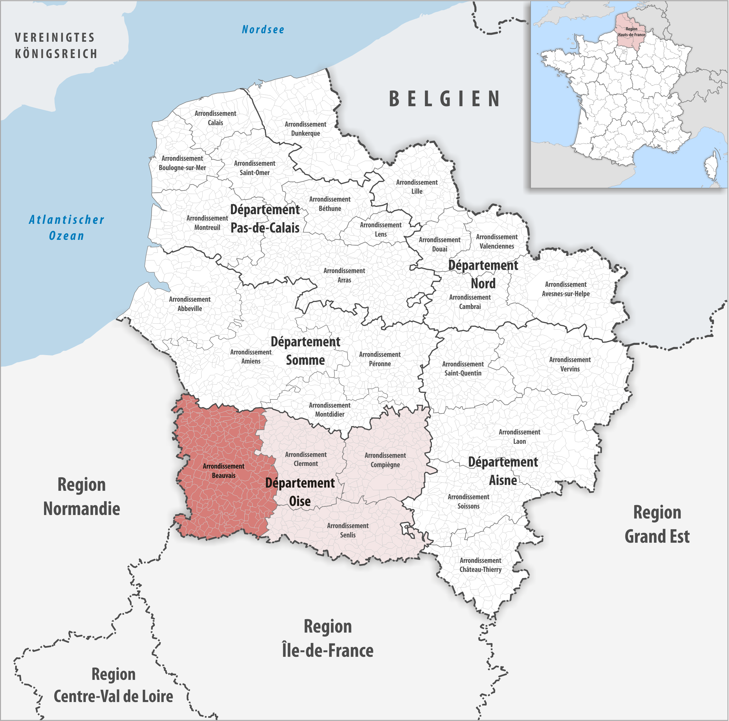 Lage des Arrondissements Beauvais